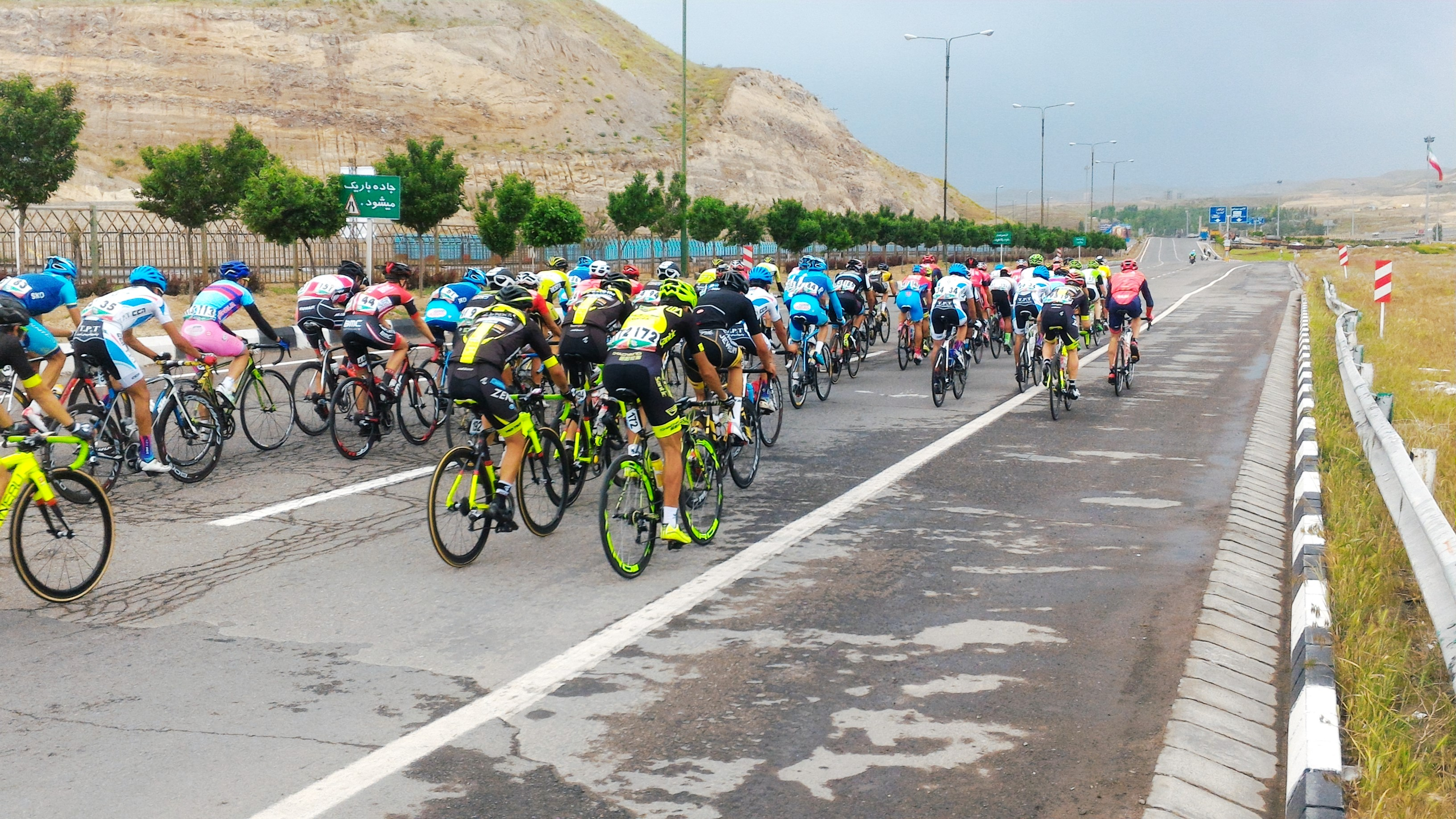 مرحله پایانی تور دوچرخه سواری آذربایجان در تبریز. اردیبهشت 1395.